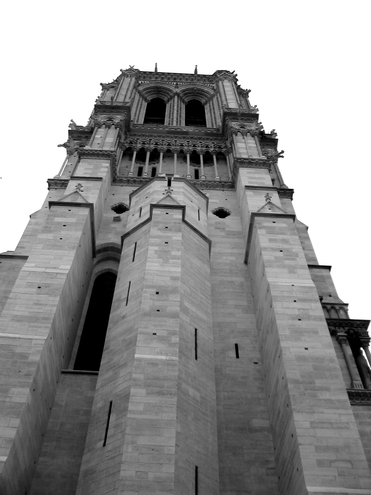 Vue du clocher Nord de la facade Ouest de Notre-Dame de Paris